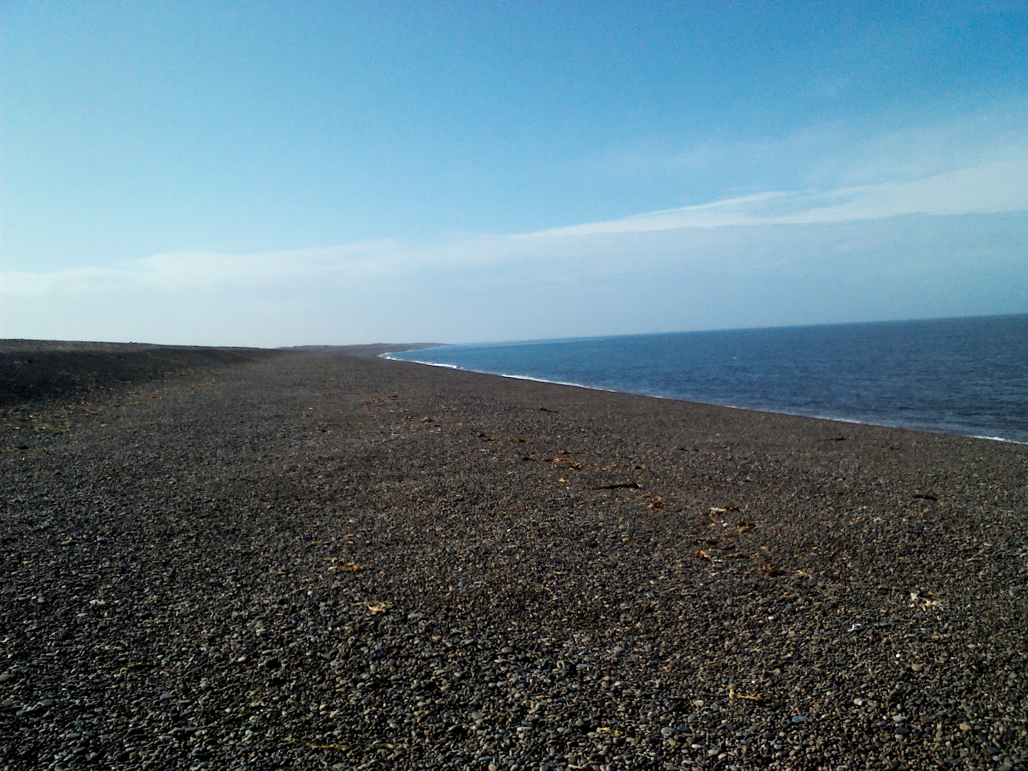 Vista de una playa al este de la península Valdes